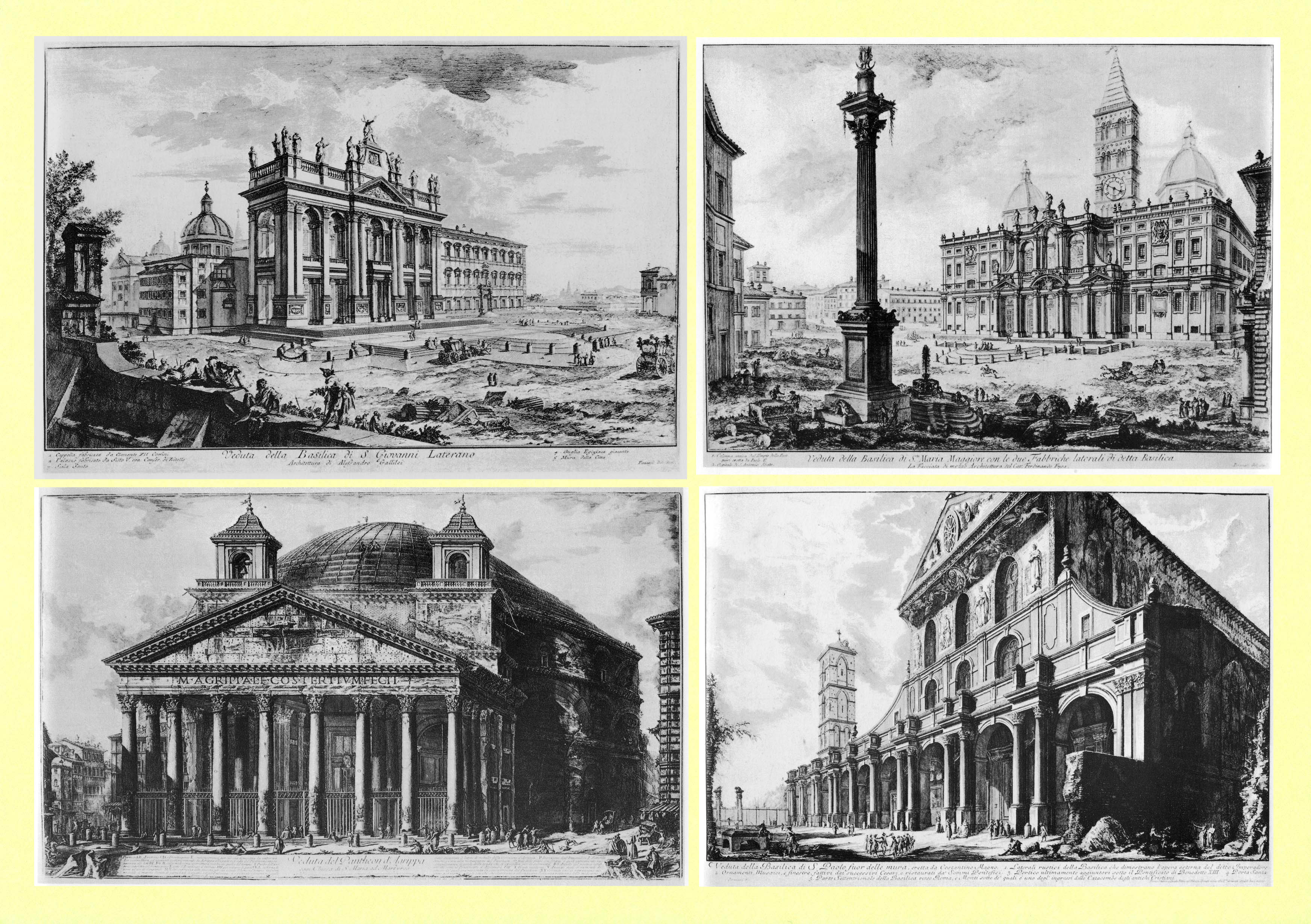 Piranesi vedutái